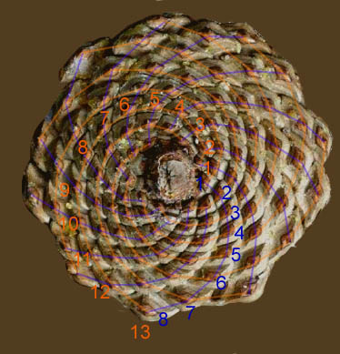 Une pomme de pin dont les spirales montrent le mécanisme de la phyllotaxie